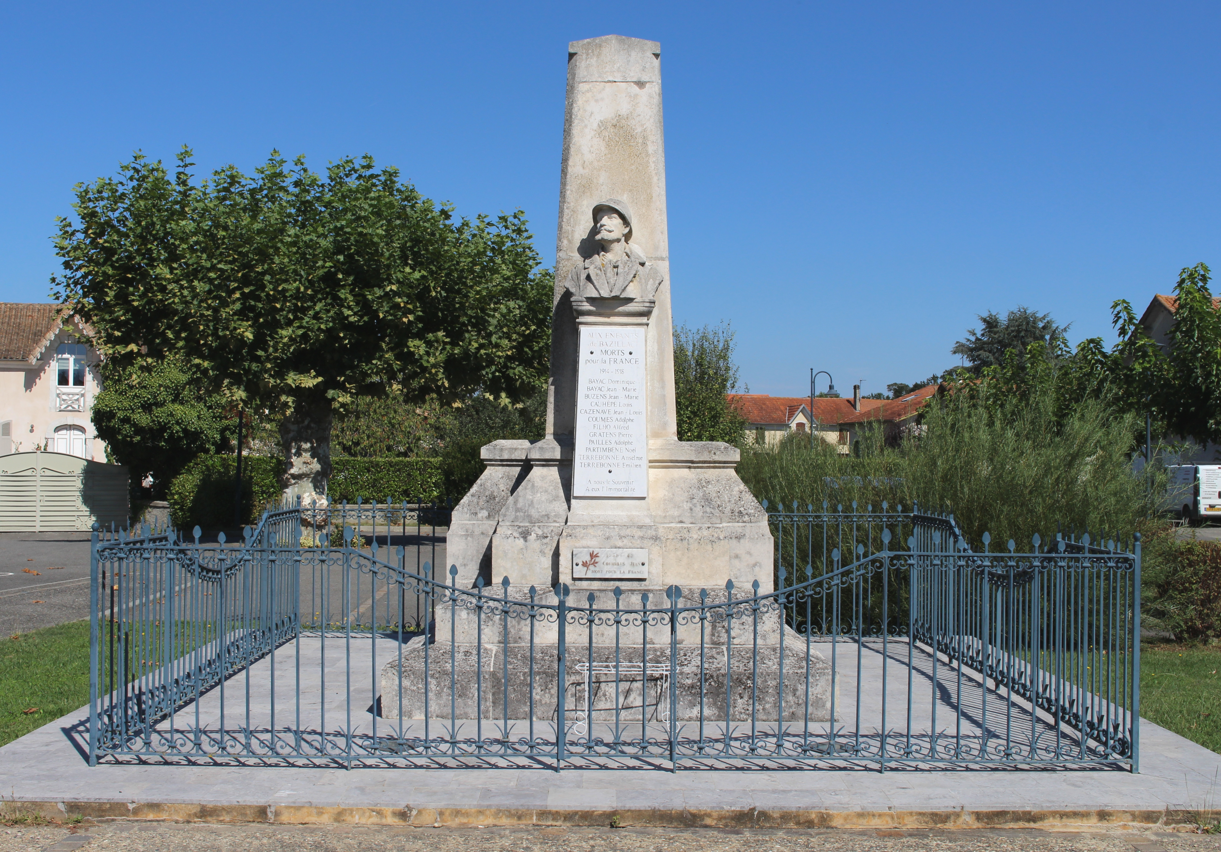 Monument aux morts de Bazillac (Hautes-Pyrénées)